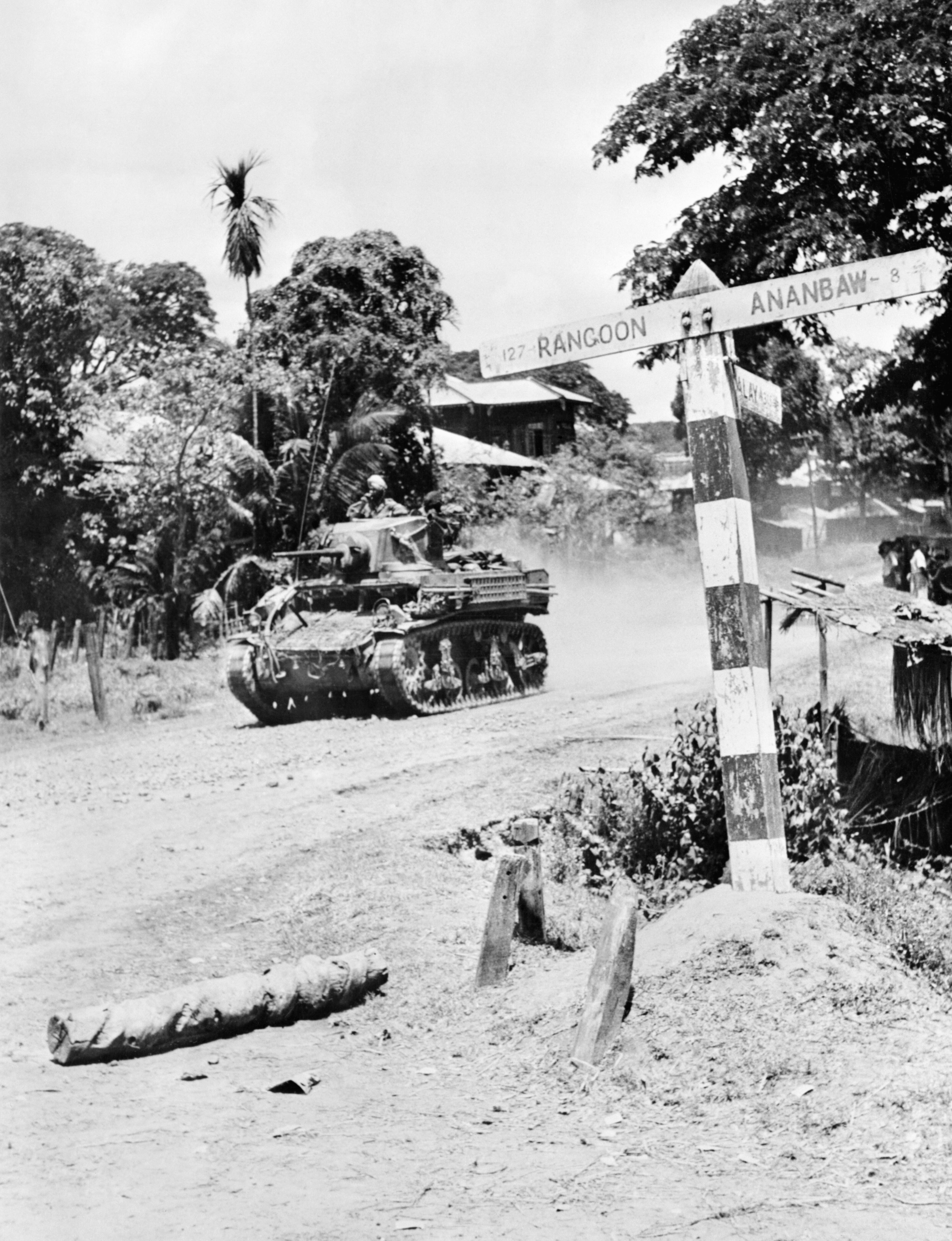 Un char Stuart de la cavalerie Indienne lors de leurs avancée vers Rangoon.